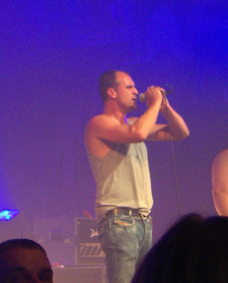 Pawel Kukiz in Poznan. Photo taken during "Spotkanie Allegro"